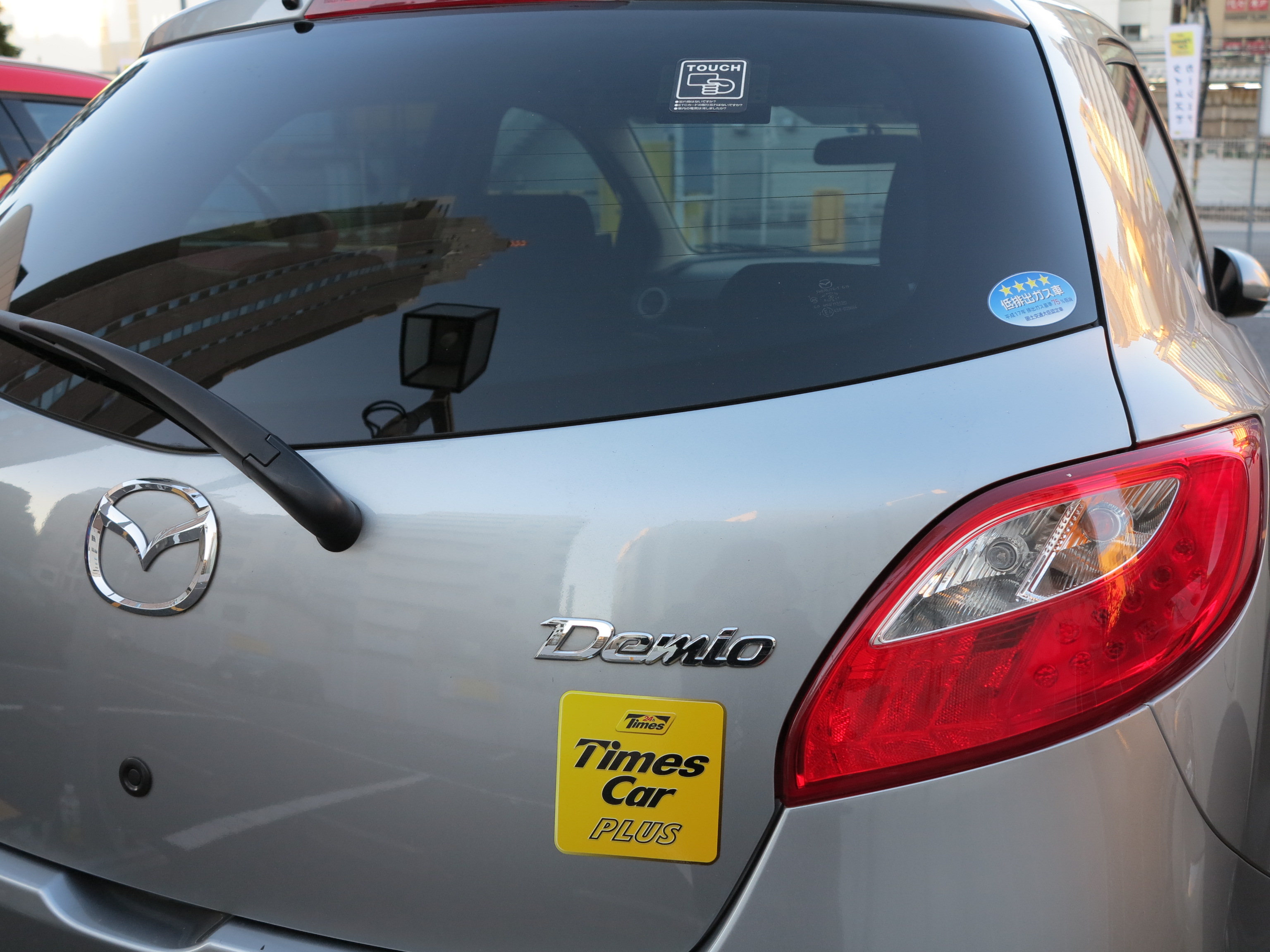 カーシェアリング貸出システム装置